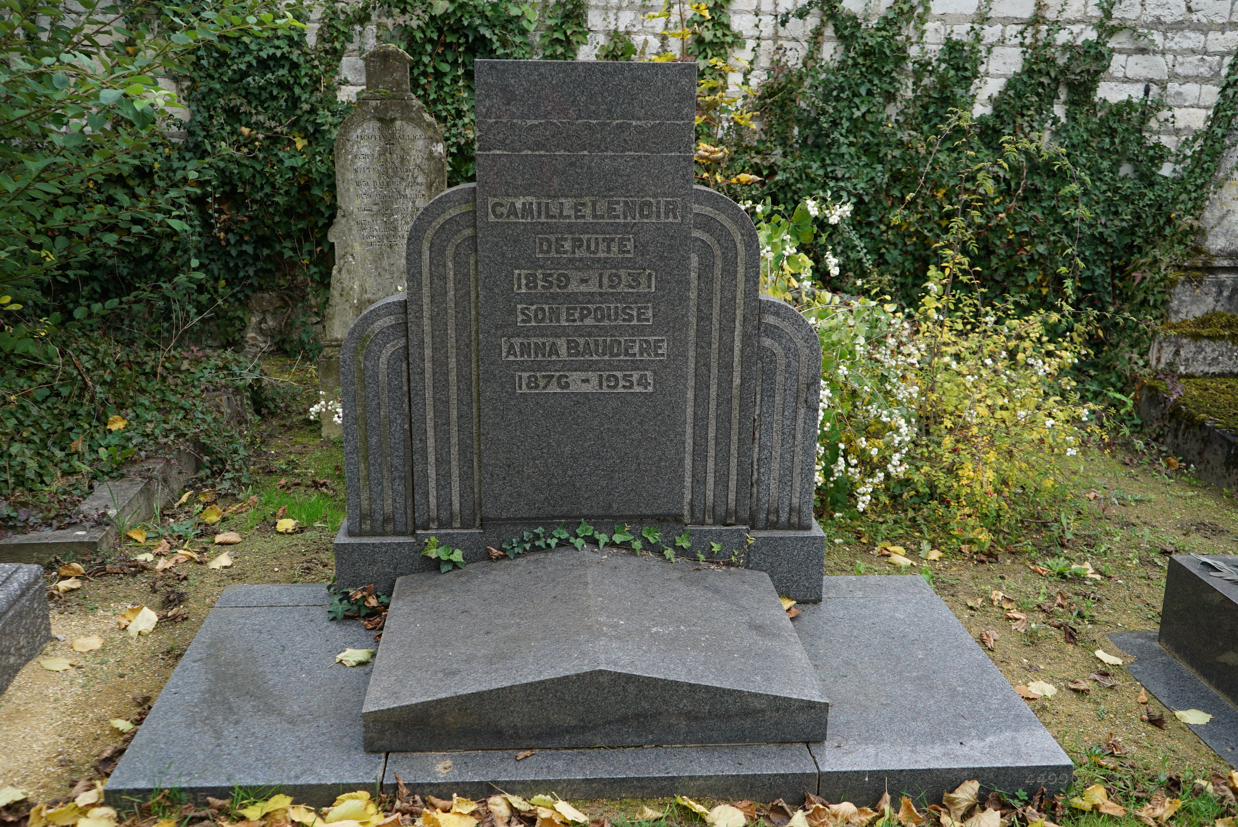 dans le 2e canton, cimetièrre du nord.